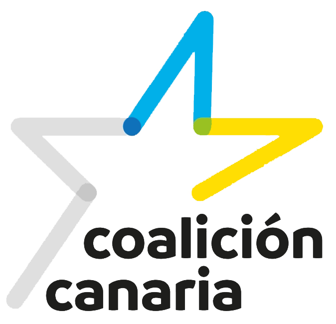 Simbolo de Coalicion Canaria